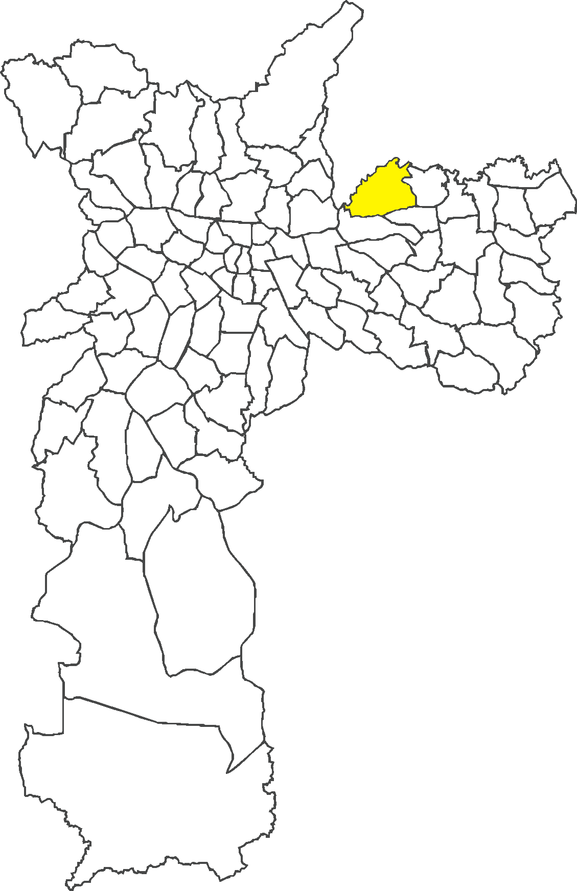 Localização do distrito de Cangaíba no município de São Paulo.